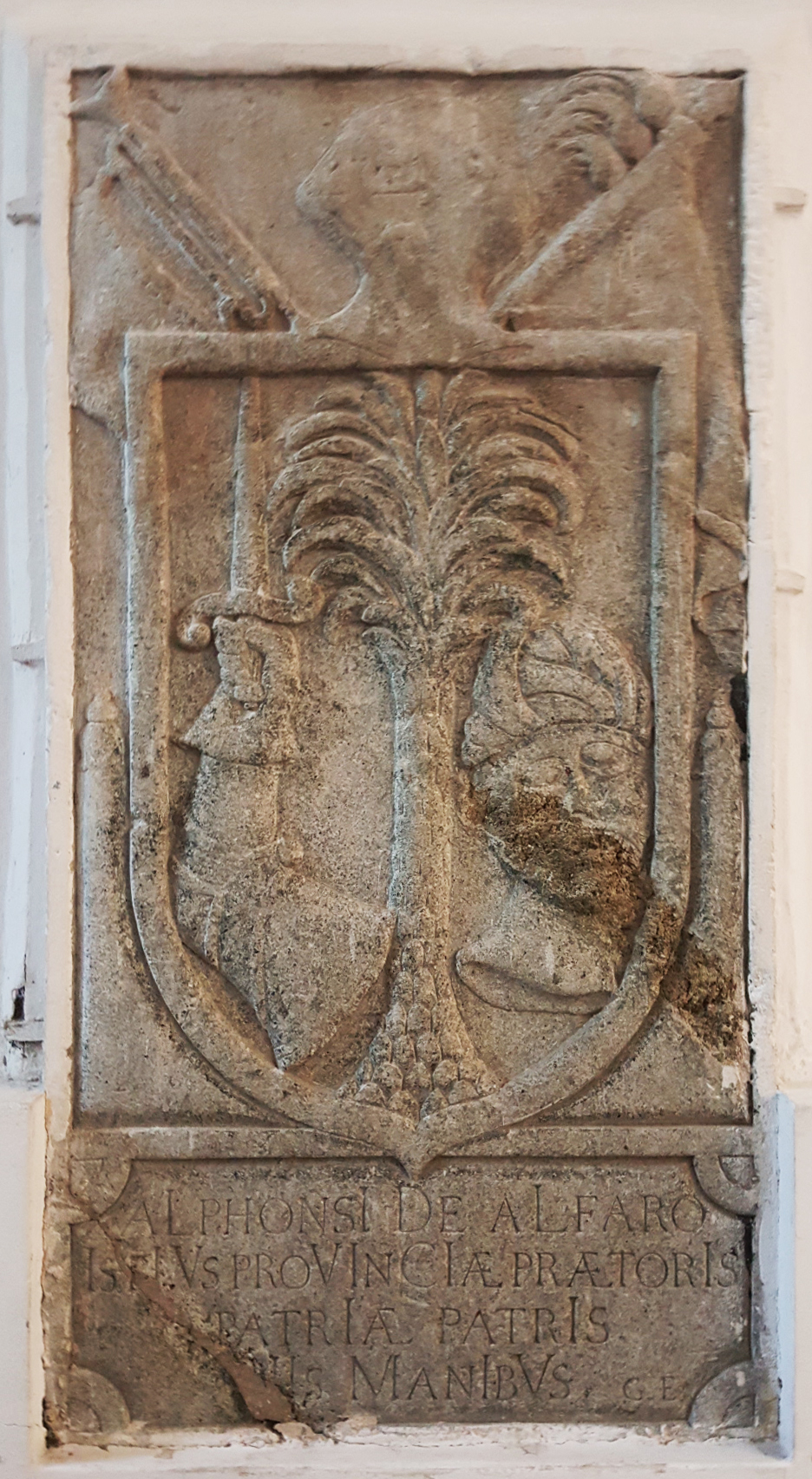 Lápida de Alonso de Alfaro, gobernador interino del Tucumán entre 1725 a 1726. La misma se encuentra en el Convento de Santo Domingo, ciudad de Santiago del Estero. En dicho convento los dominicos fueron los continuadores en ese templo de los jesuitas, tras su expulsión. La lápida reza: "Alphonsi de Alfaro, Istitus Provinciae Praetoris, patriae patris, piis manibus" (De Alfonso Alfaro, gobernador de esta provincia, padre de la patria, a los píos manes).